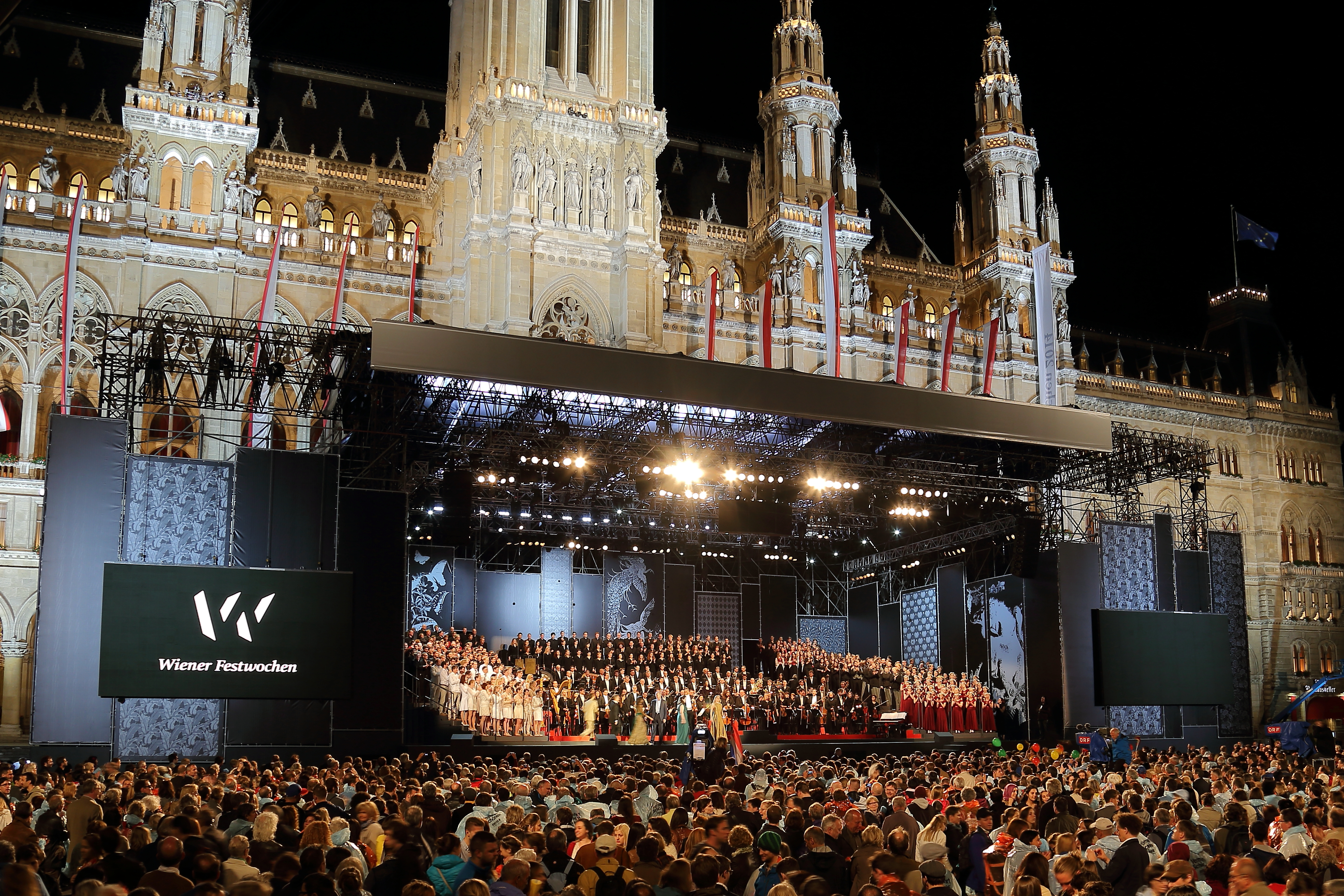 Eröffnungsveranstaltung der Wiener Festwochen 2014 am 9. Mai mit dem Arnold Schoenberg Chor und dem Radio-Symphonieorchester Wien unter der Leitung von Cornelius Meister. An Gastchören nahmen teil: BNR Mixed Coir aus Bulgarien, Concordia Discors aus Kroatien, coro siamo aus Österreich, Euga aus Finnland, La Maîtrise de Paris aus Frankreich, Liepaites aus Litauen, Sola aus Lettland und Vox Bona aus Deutschland. Die Moderatoren Cornelius Obonya und Alice Tumler führten durch die Veranstaltung.